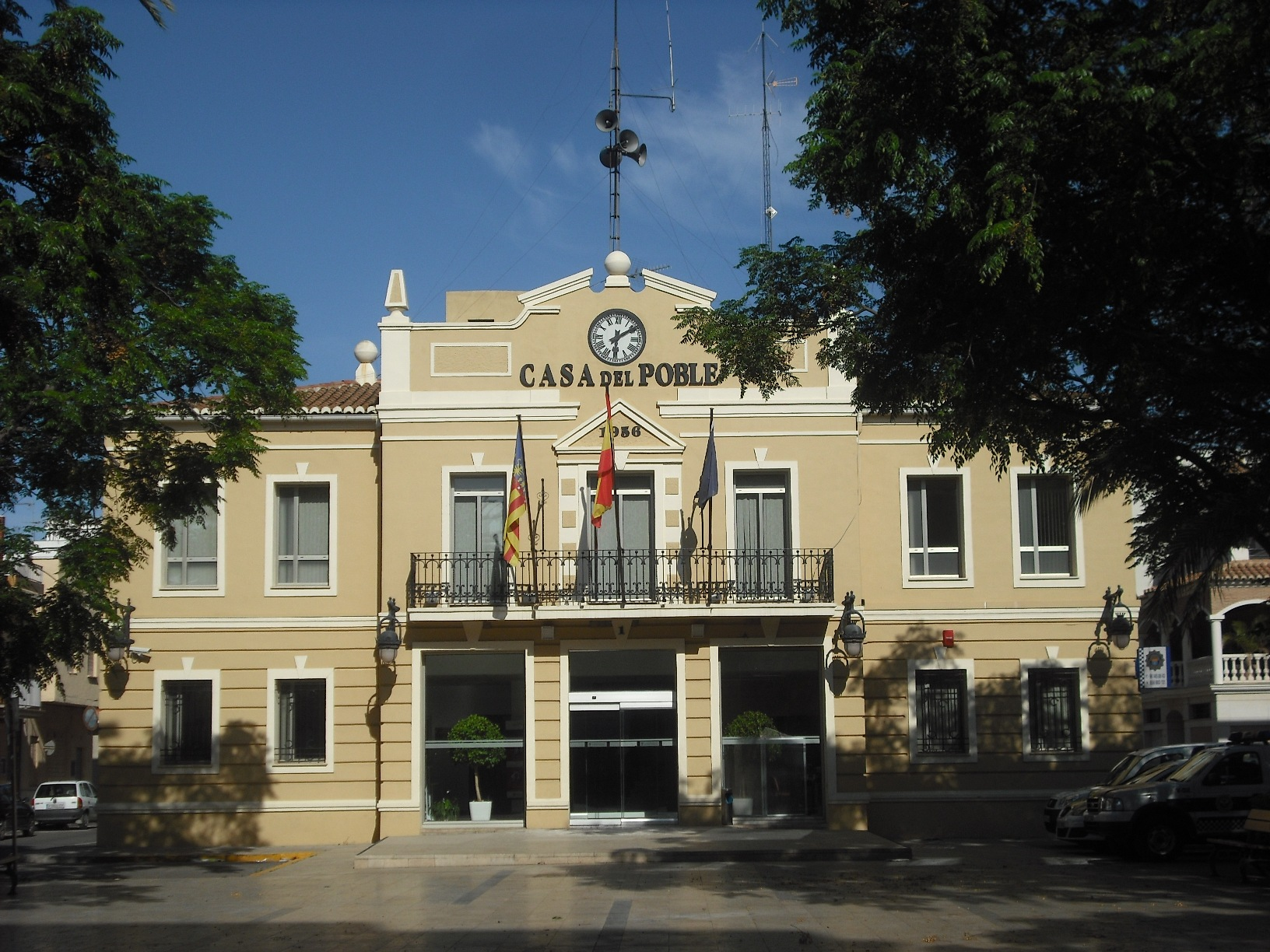 Ajuntament de la Pobla de Farnals.